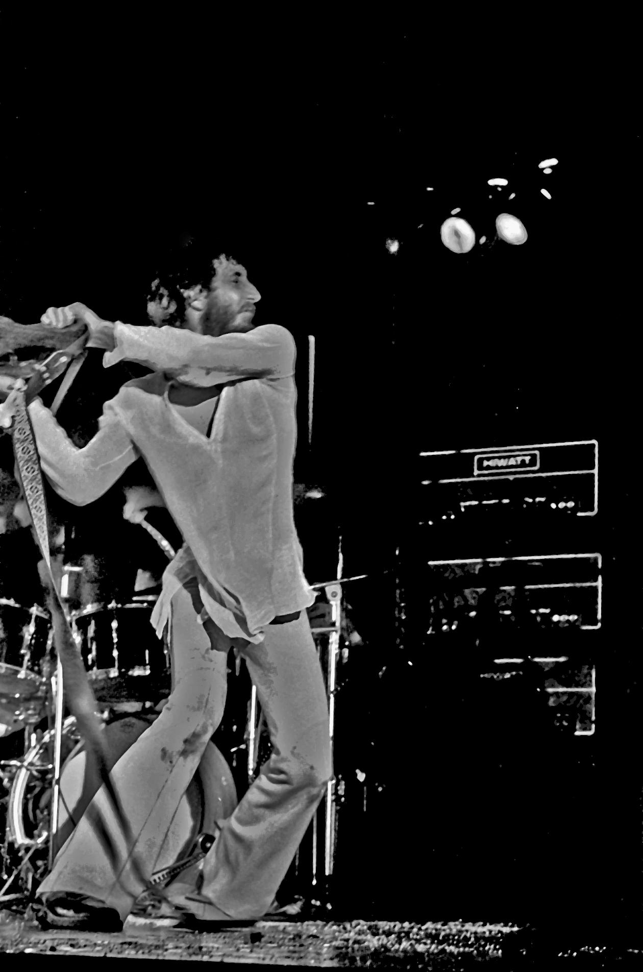 Gleich splittert die Gitarre, und ein Trümmerteil trifft meine Nase. Eine Narbe, auf die ich bis heute stolz bin. The Who, Ernst-Merck-Halle Hamburg, August 1972: Pete Townshend spielt Berserker